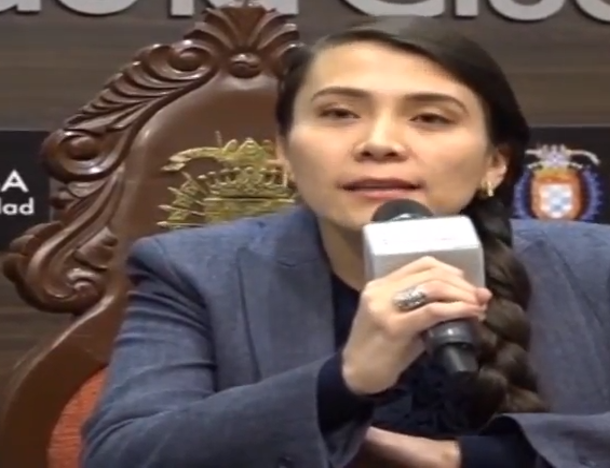 Alcadesa Karen Suárez en 2018